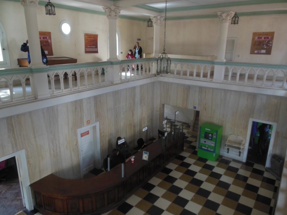 Banco Infantil de la República de los Niños